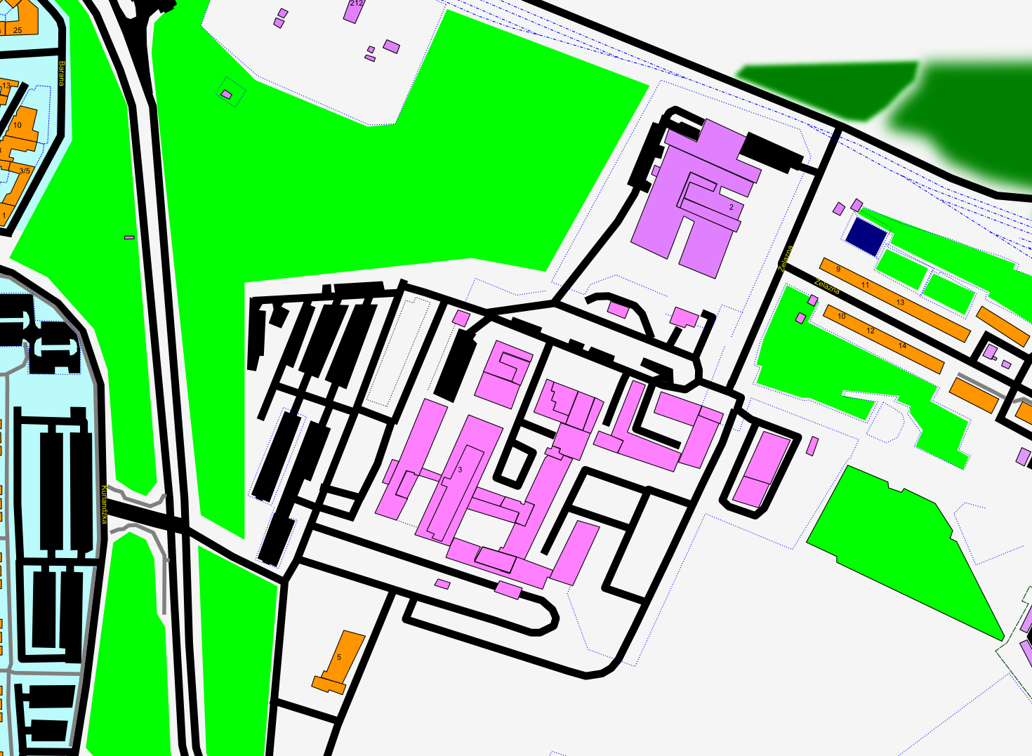 Wielospecjalistyczny Szpital Miejski im. J. Strusia w Poznaniu - mapa